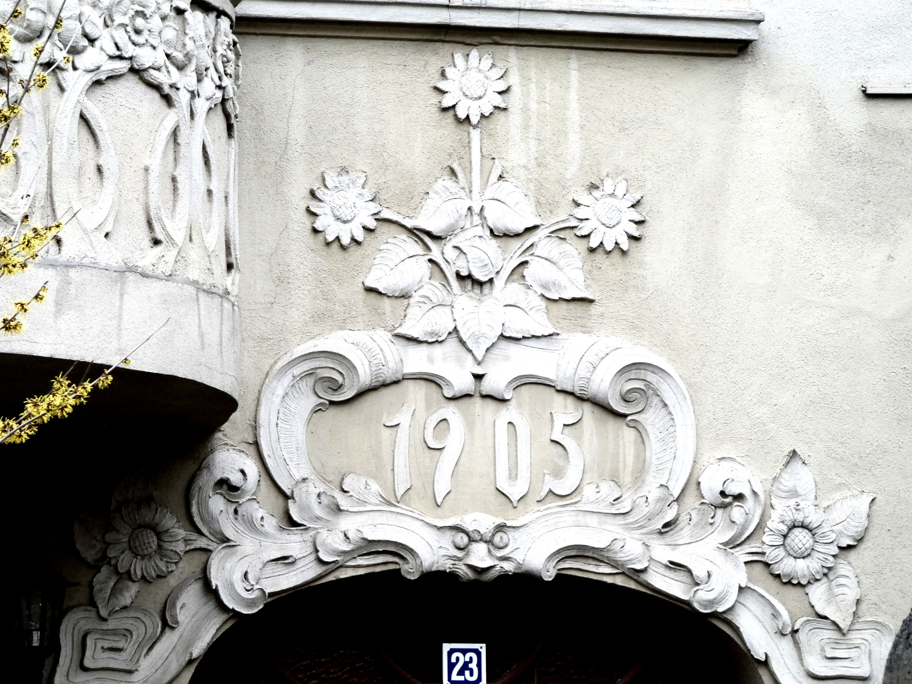 Portaldetail am Haus Richard-Wagner-Straße 23, Halle (Saale)